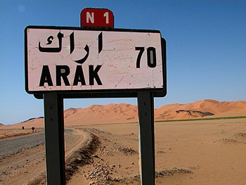 photo d'indication kilométrique